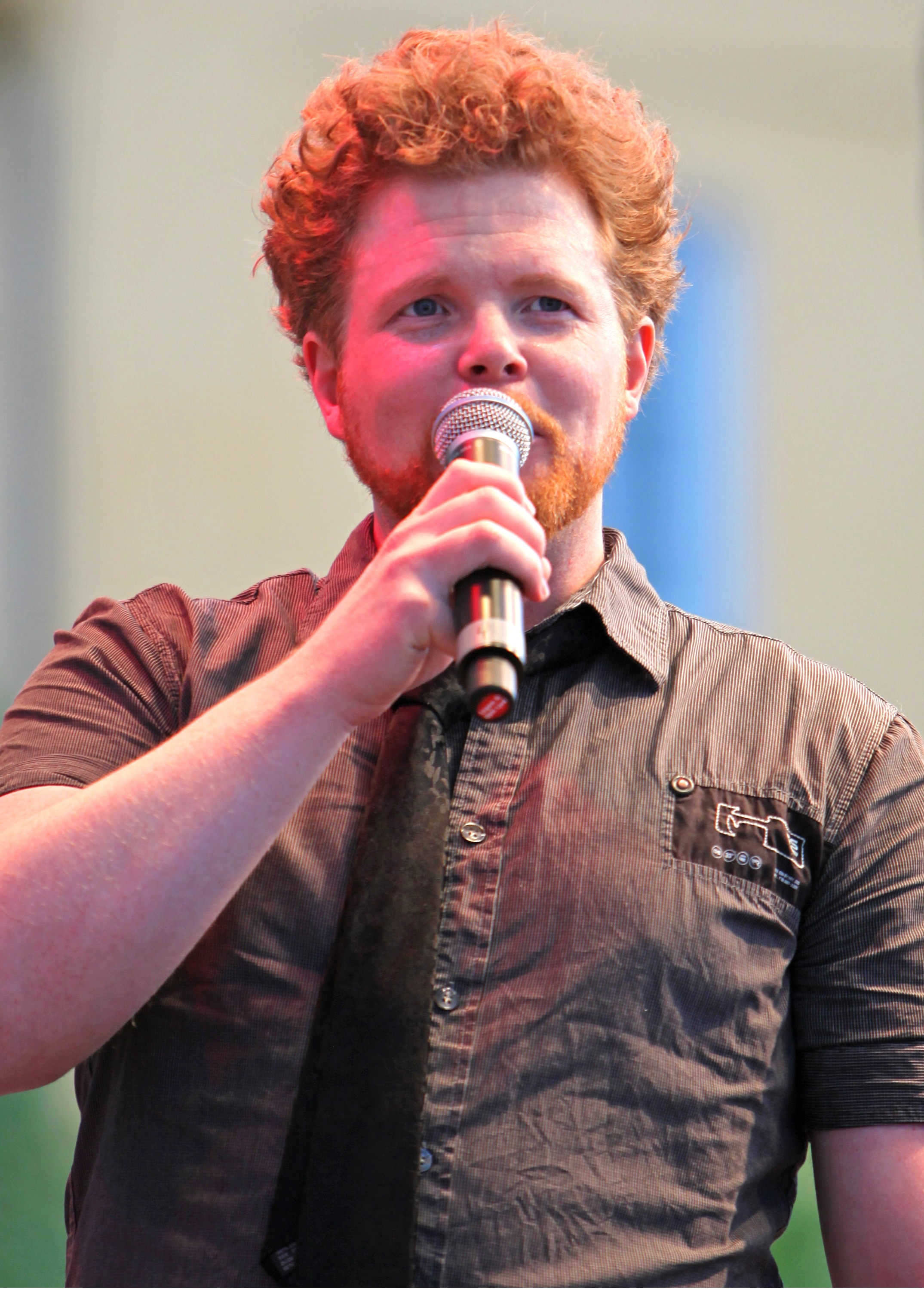 Daniel Lindström in Kungsträdgården Stockholm 2009